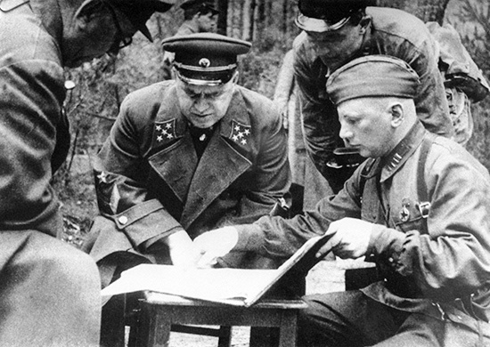 Генерал армии Георгий Жуков под Ельней, 1941г.